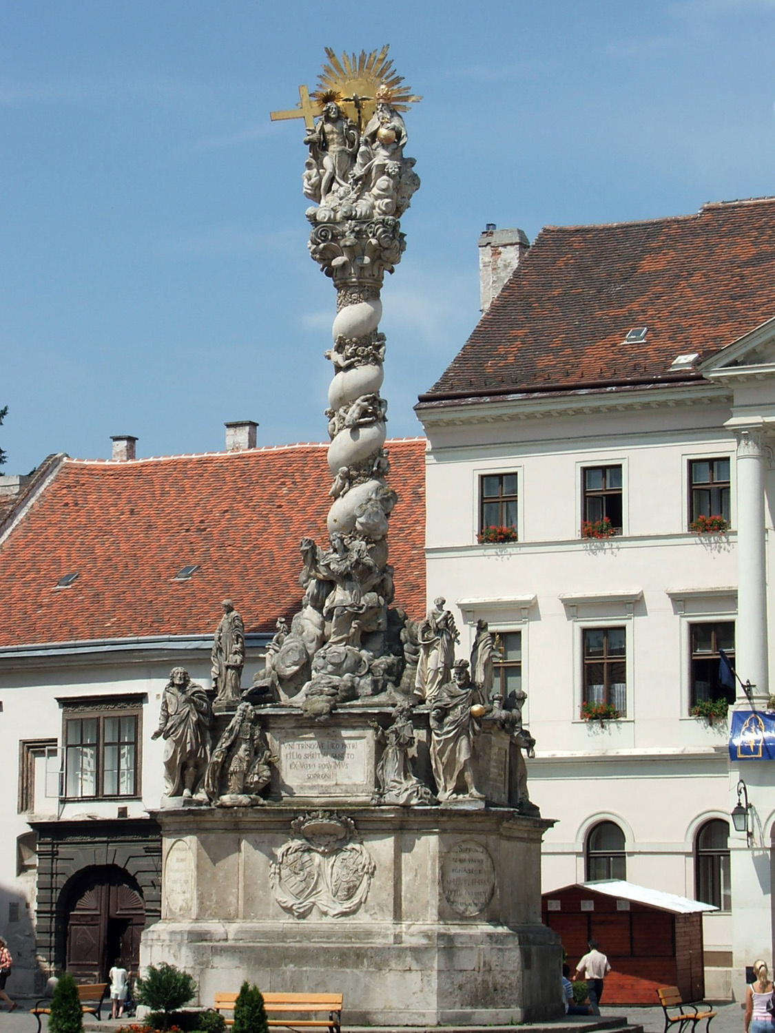 Szentháromság-oszlop (Sopron, Fő tér) This is a photo of a monument in Hungary, Identifier: 4778